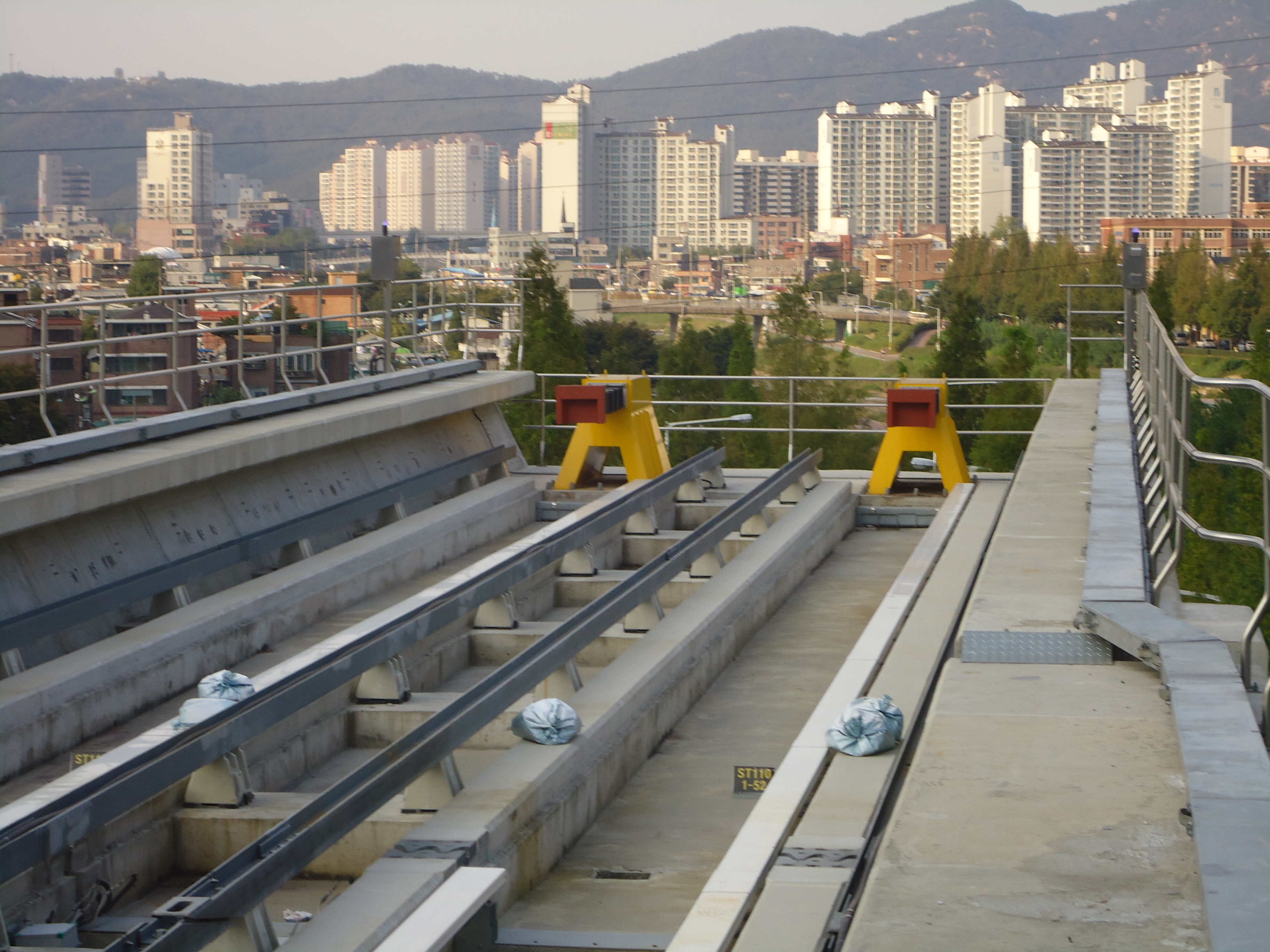 의정부경전철 선로는 발곡역을 조금지나 끝이난다. 향후 연장계획이 있어 끝부분은 미완성으로 남았다.